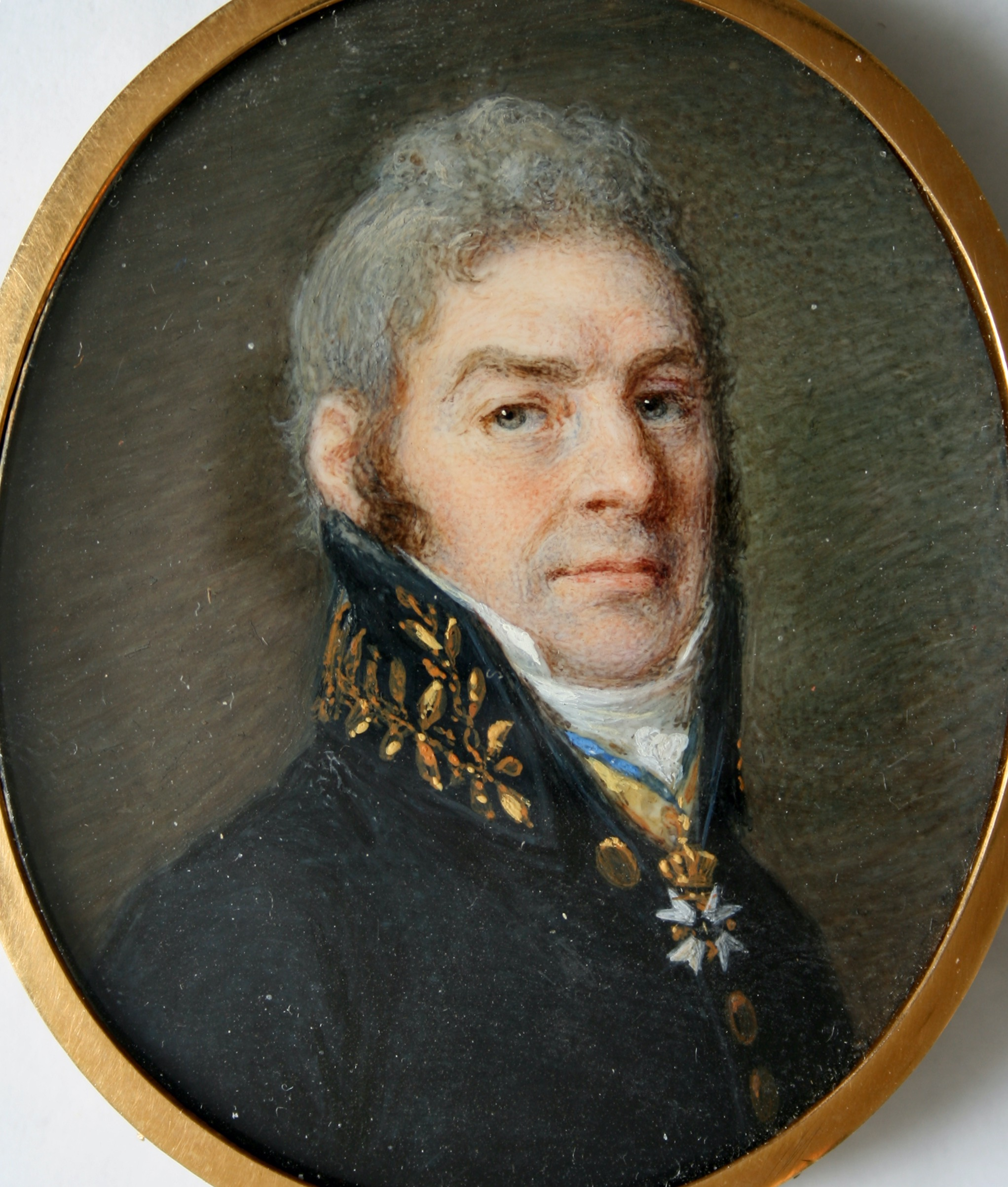 Landshövding Gustaf Edelstam målad av Lorens Sparrgren omkr. 1810.